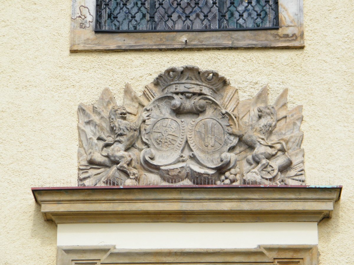 Kostel svatého Mikuláše v Mikulášovicích, průčelí - znak nad hlavním vchodem